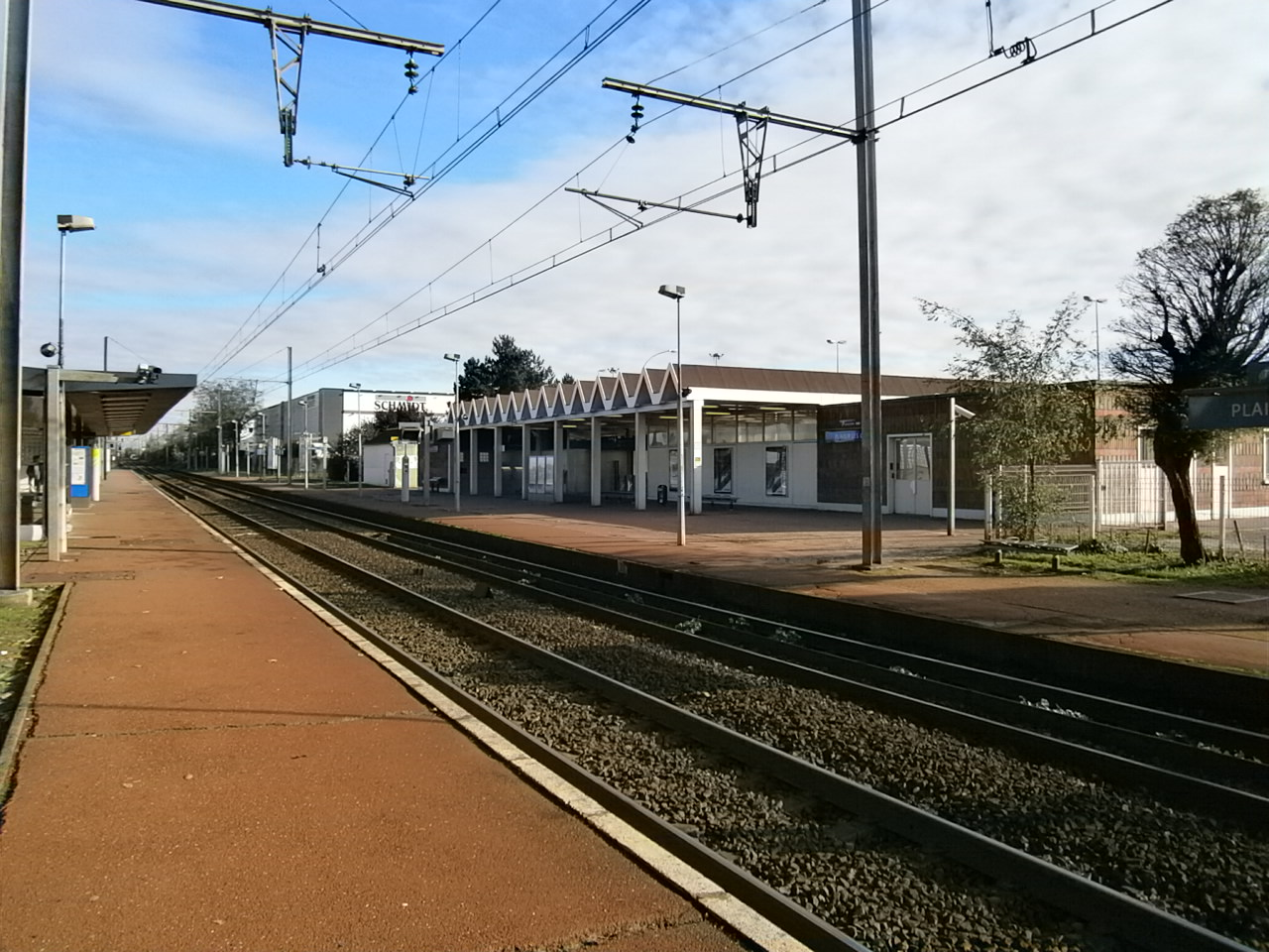 Gare de Plaisir - Les Clayes (78) : Les quais, le bâtiment voyageurs et la marquise.